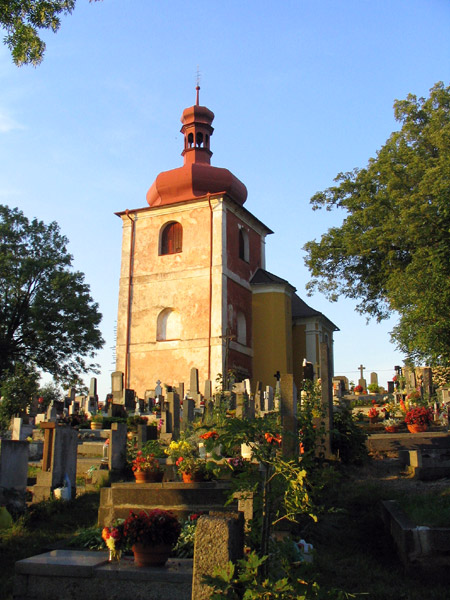 Barokně upravený gotický kostel sv. Vavřince na hřbitově ve Strašicích.